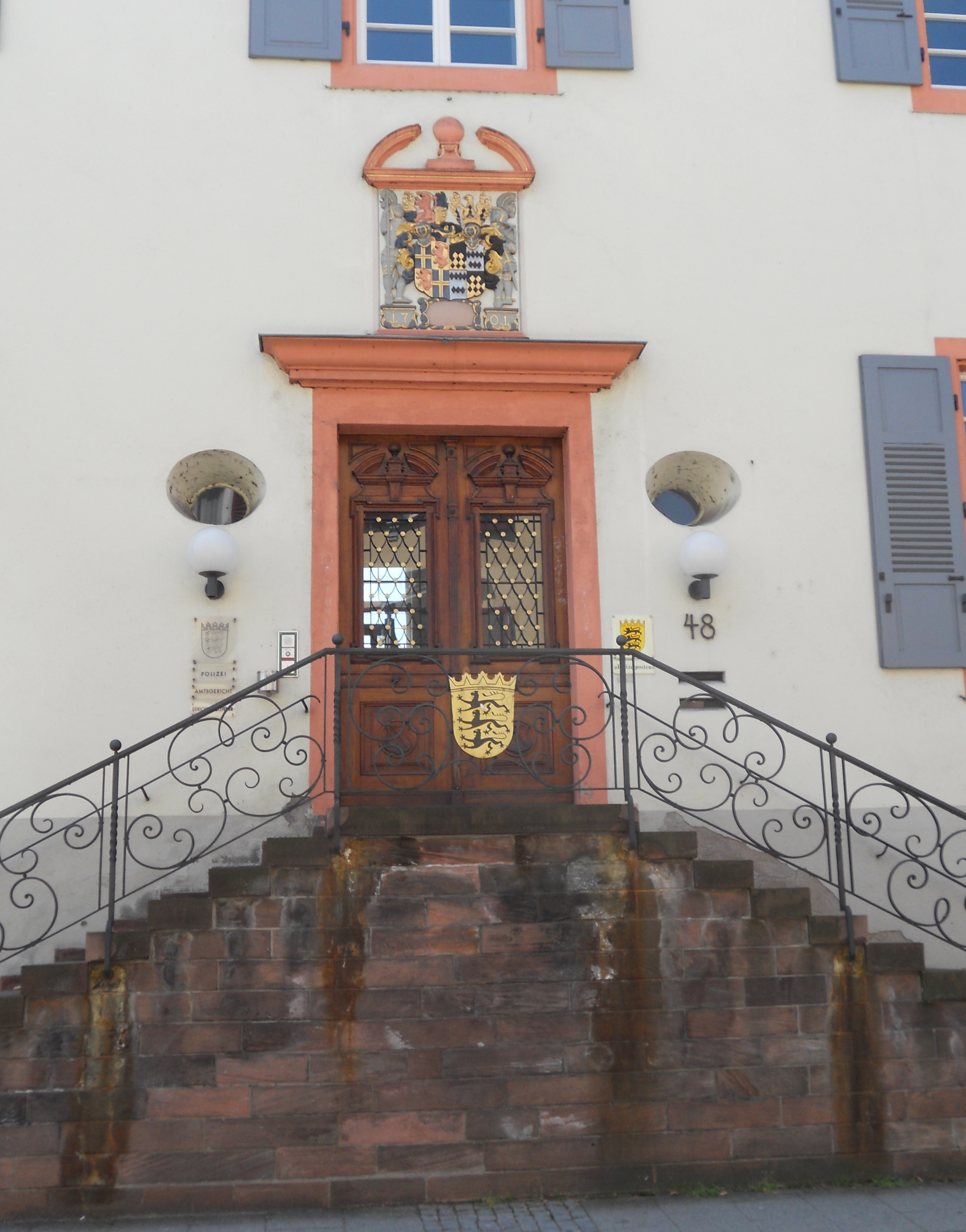 Portal des Amtshauses in Oberkirch. Amtshaus in der Hauptstraße 48, ehemaligen Sitz der Strassburger Fürstbischöfe. Das Gebäude wurde im Jahr 1704 errichtet. Darin war auch von 1758 bis 1772 die Münzstätte des Straßburger Fürstbischofs untergebracht.